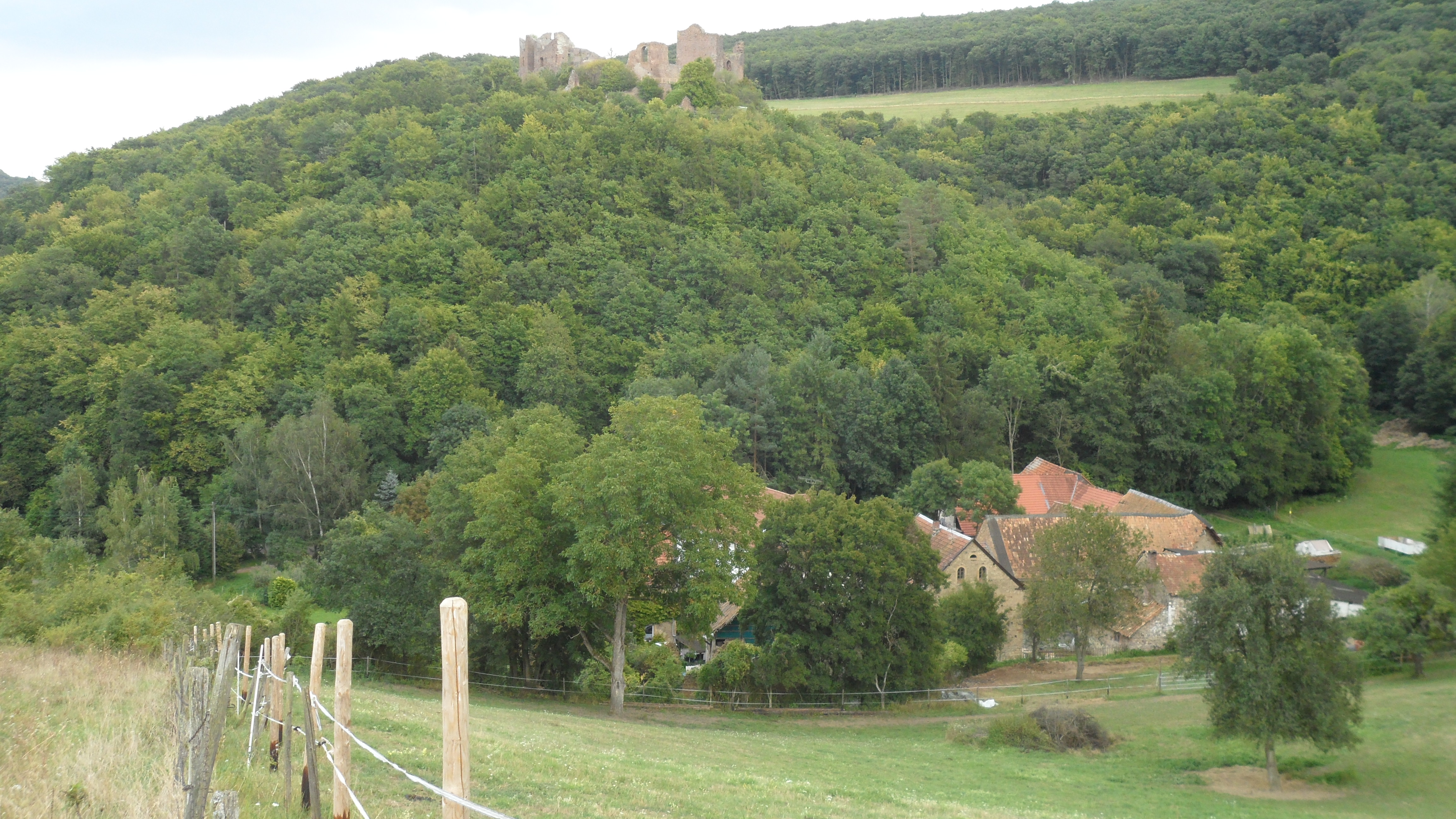 Unten Montforterhof (vermutlich „neues Schloss im Tal“) und oben Ruine Montfort; Duchroth, Landkreis Bad Kreuznach.